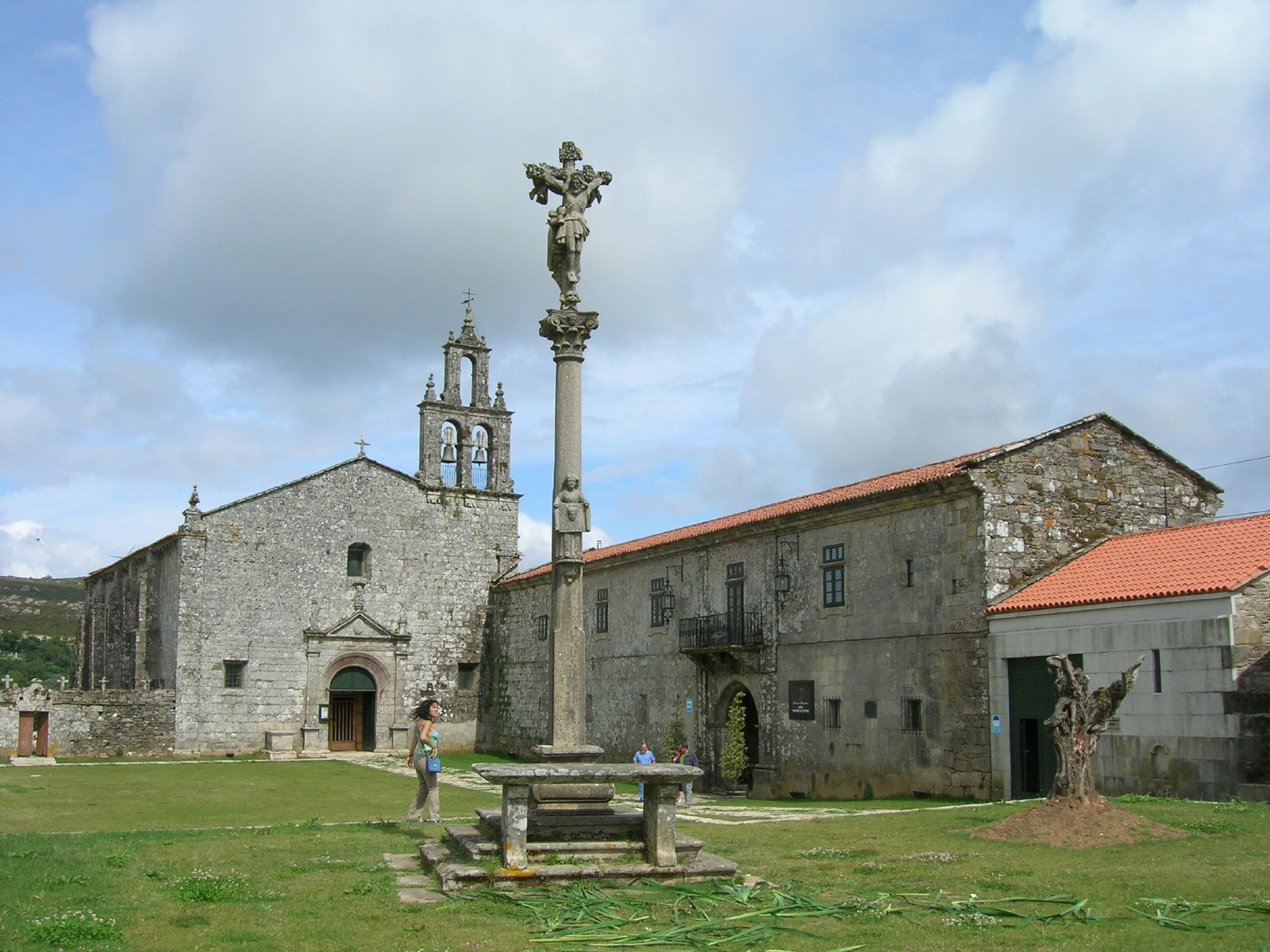 Mosteiro de Santa María de Acibeiro, Galicia - Spain'Monasterio de Santa María de Acibeiro'